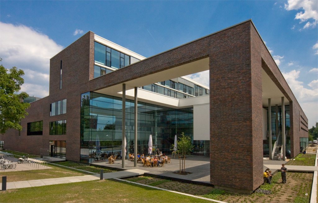 ELBCAMPUS Ansicht mit Haupteingang